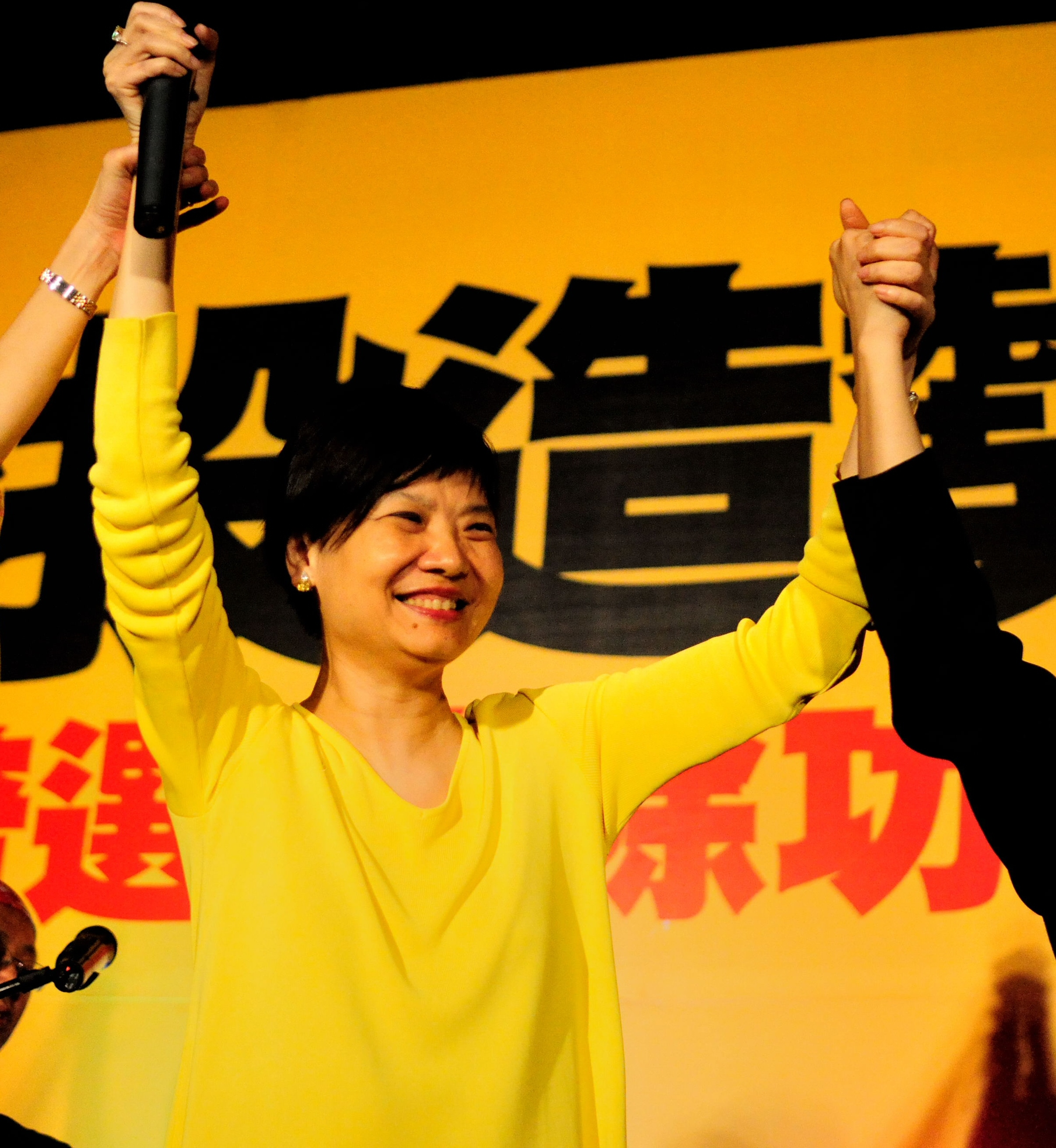 中文（香港）: 香港立法會議員余若薇在2010年五區公投爭取真普選大會